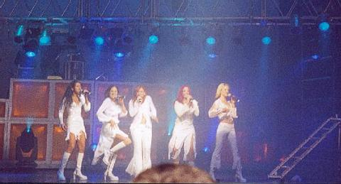 Recital Bandana - Gran Rex